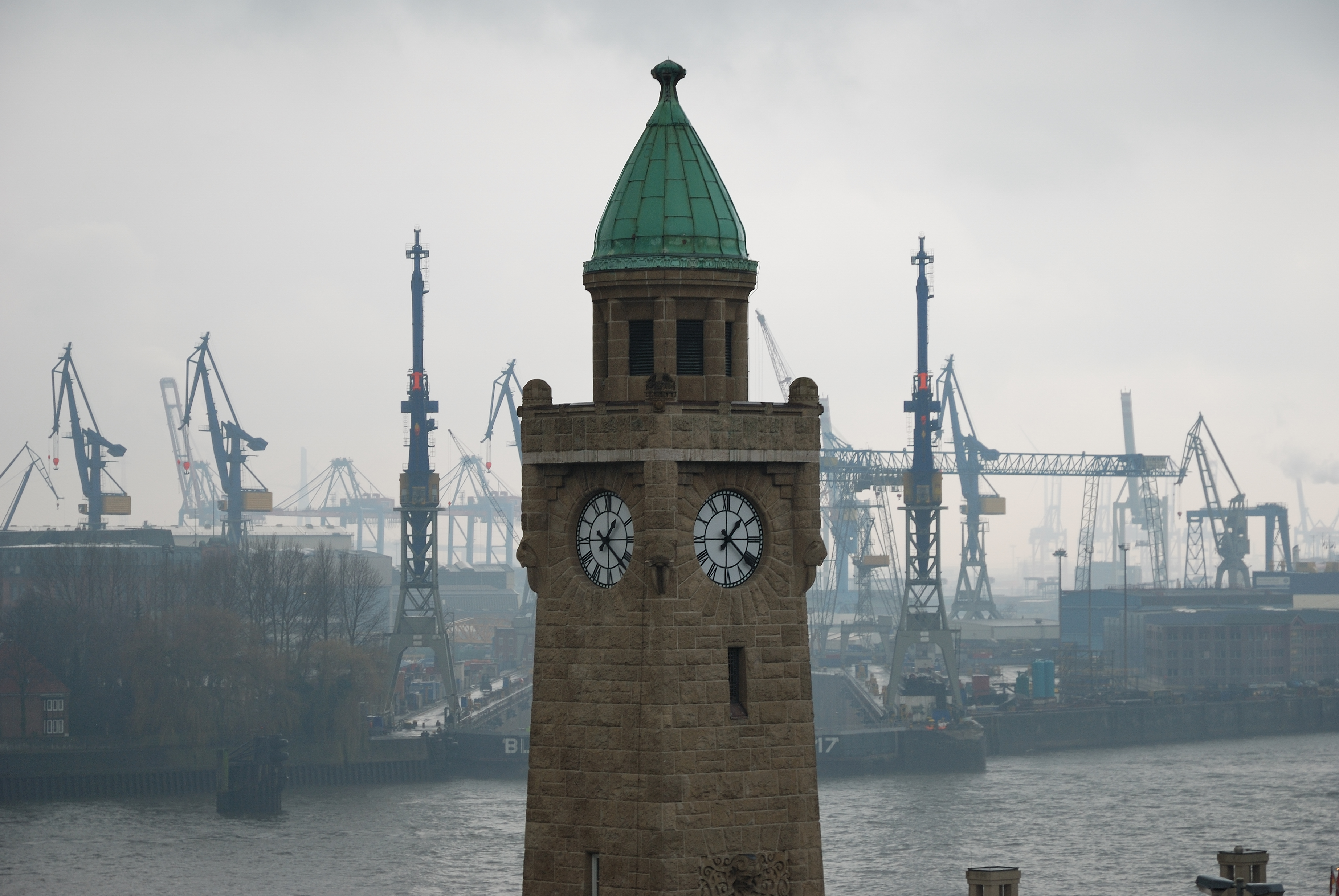 Hamburg Landungsbrücken, im Hintergrund Blohm + Voss